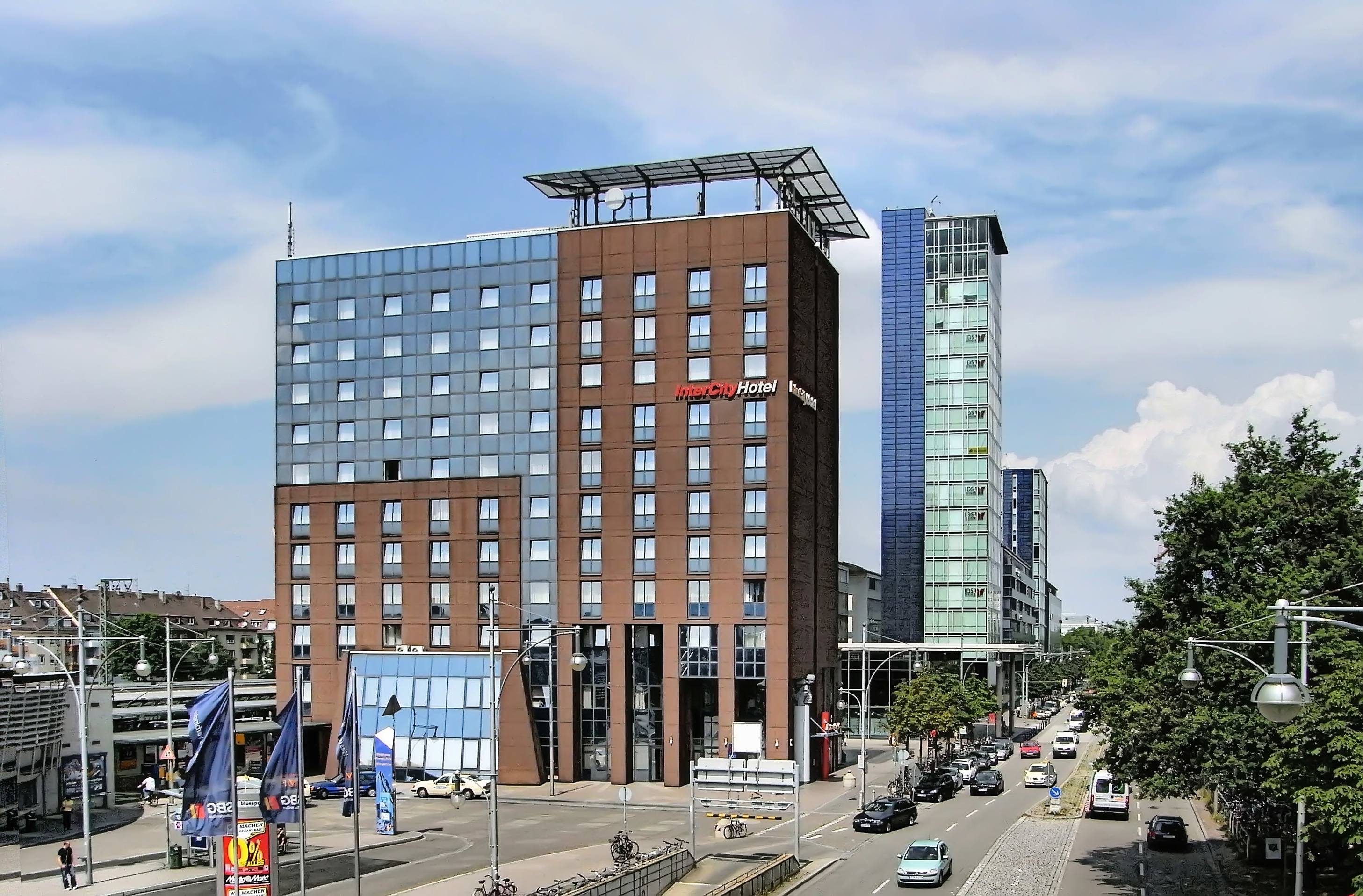 Bilder des Freiburger Hauptbahnhofs: Blick von der Brücke in Richtung Haupteingang